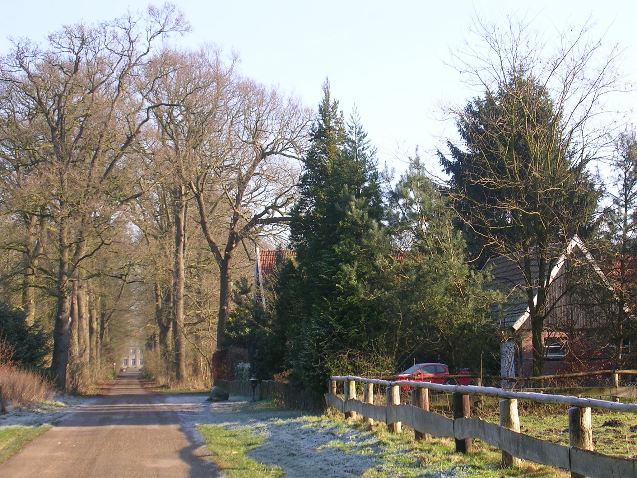 Klosterallee – Blick durch die Allee Richtung Kloster Frenswegen, Nordhorn, Niedersachsen, Deutschland